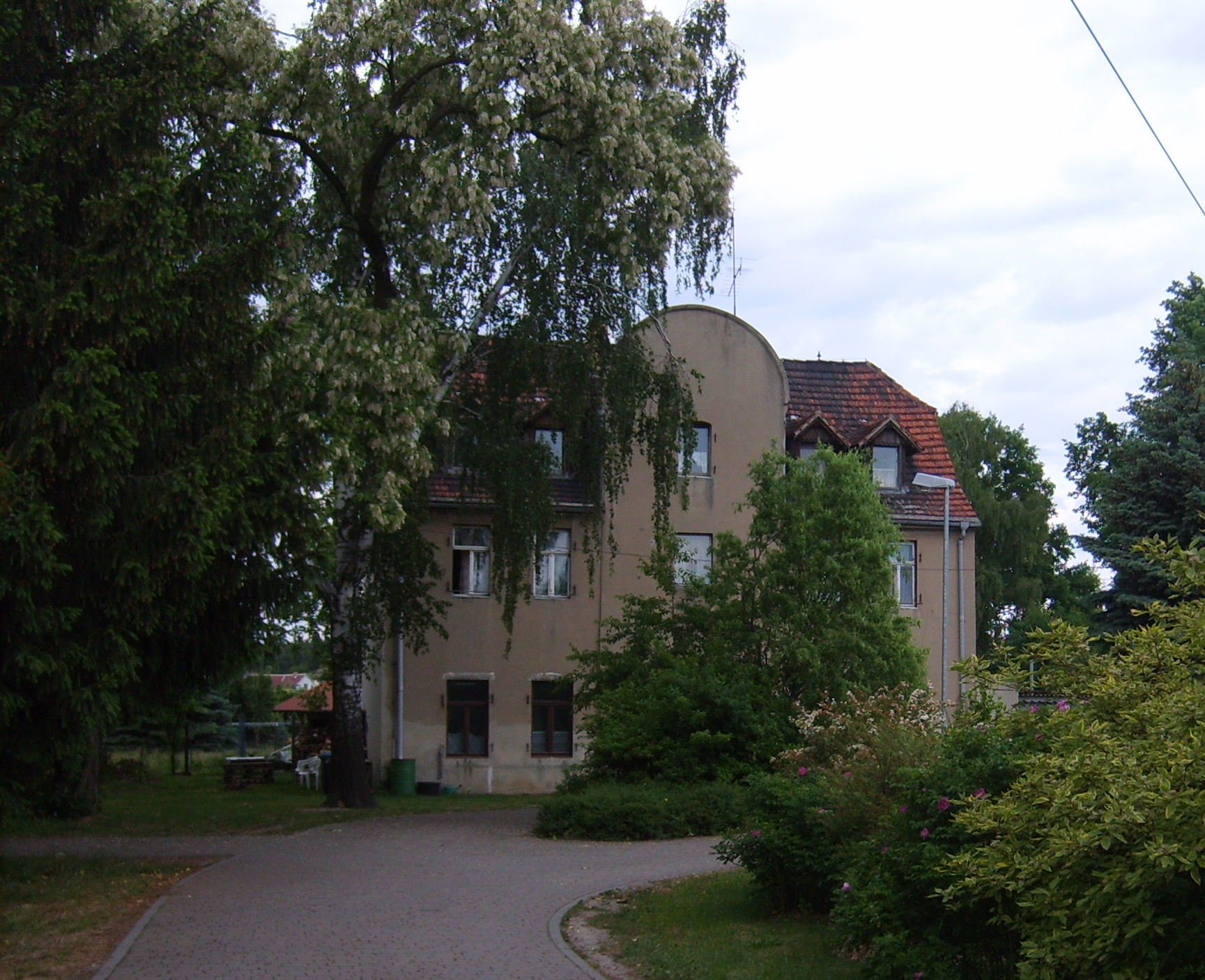 Prestewitz